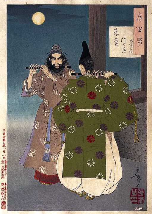 Hakuga no Sammi